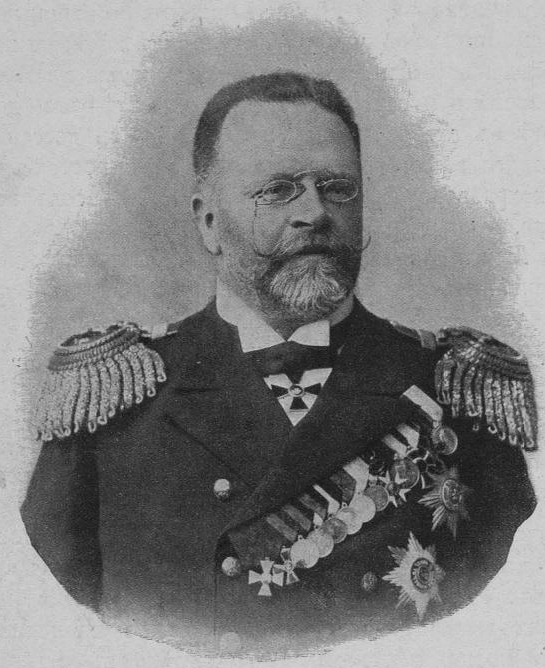 Скрыдлов, Николай Илларионович